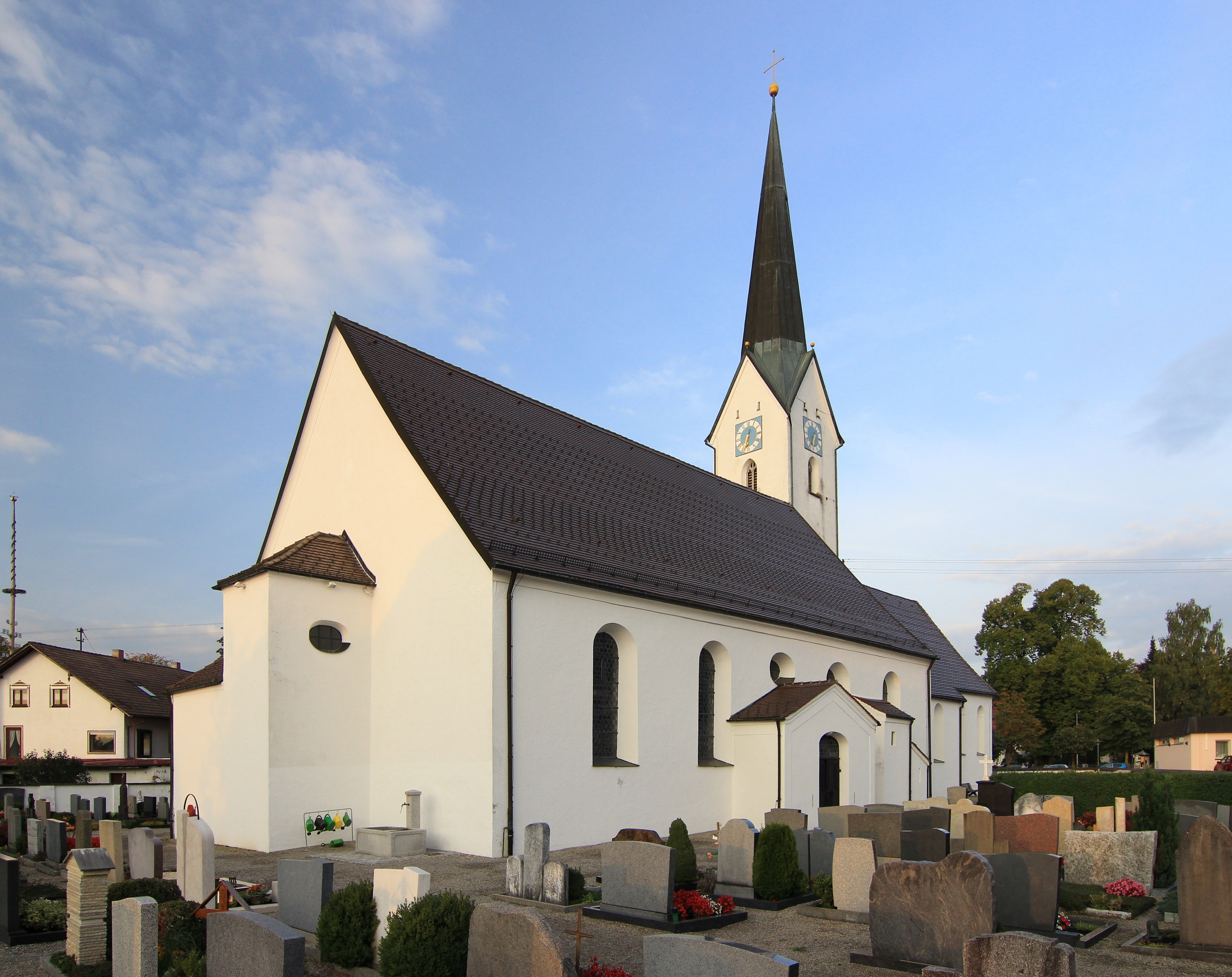 Heilig-Geist_(Durach)This is a photograph of an architectural monument.